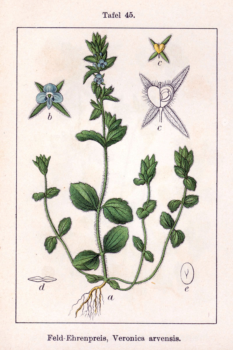 Veronica arvensis L. Original Description Feld-Ehrenpreis, Veronica arvensis